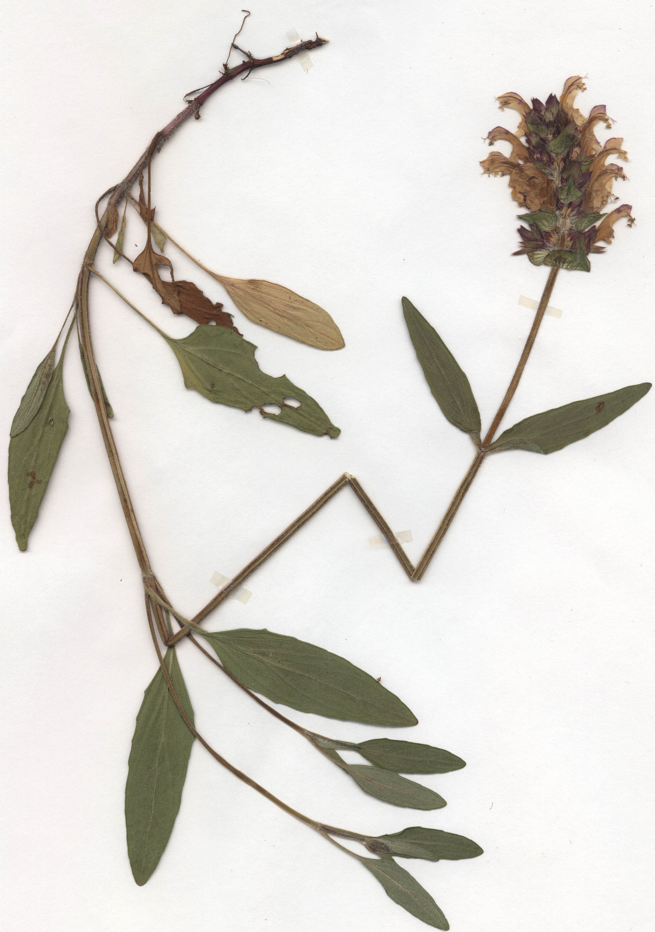 Prunella grandiflora, weiß, eigener Herbarbeleg